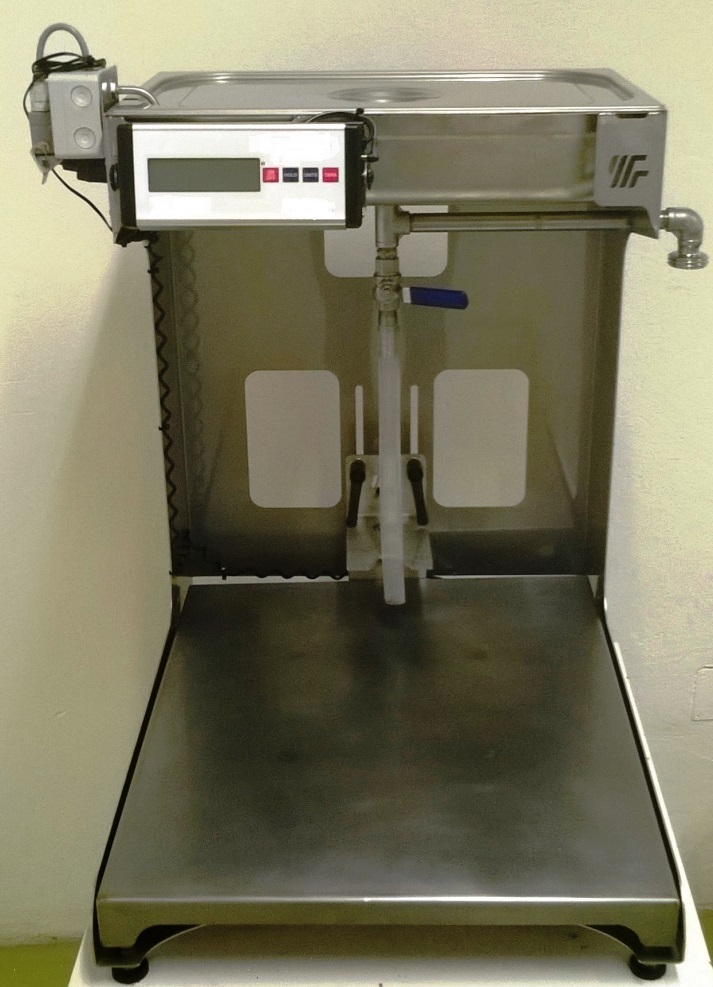 Gravitation BIB Füller 500 l/h